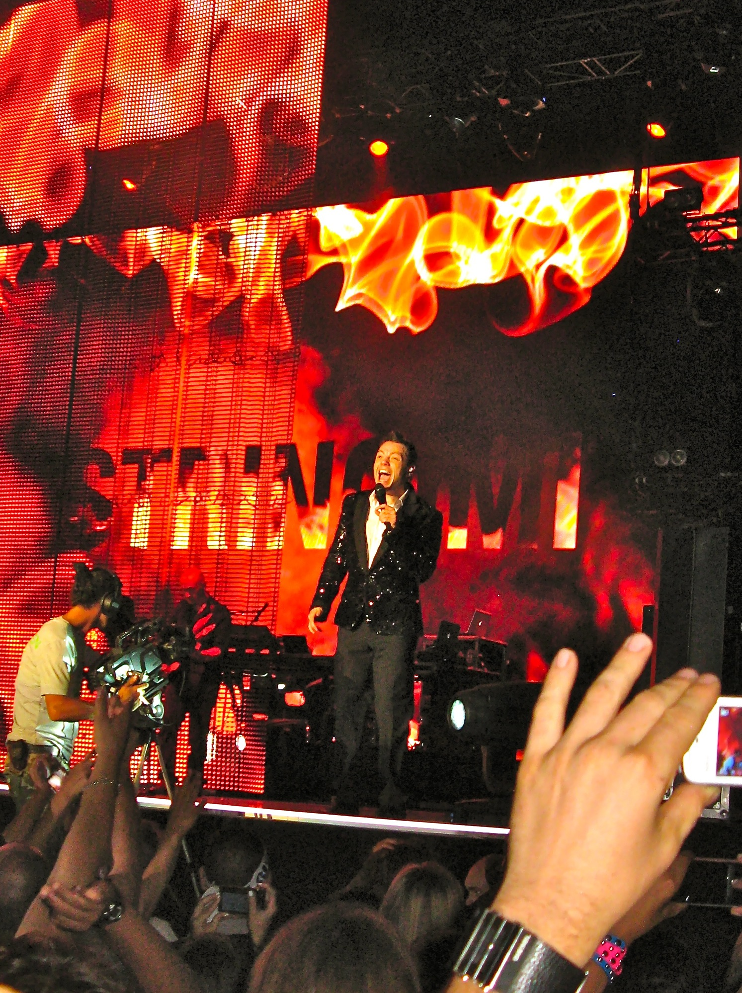 il cantante Tiziano Ferro interpreta Xverso all'Anfiteatro Camerini di Piazzola sul Brenta.